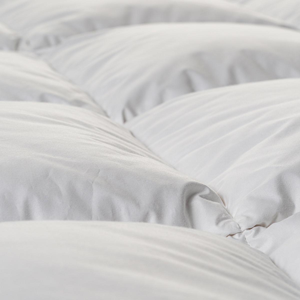 Gesteppte Kammern eines Karo-Duvets